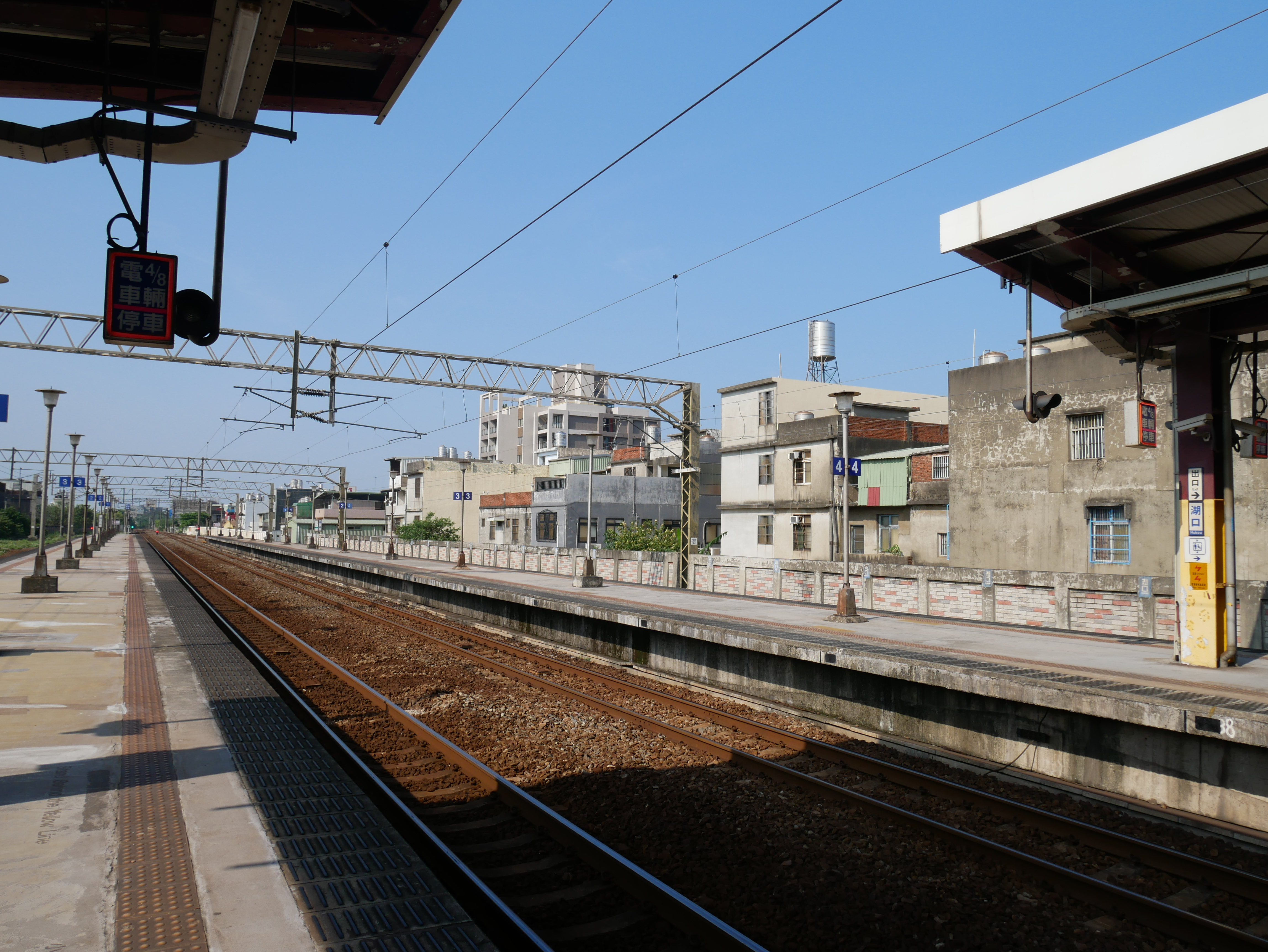 臺鐵湖口車站月台，新竹縣湖口鄉仁勢村